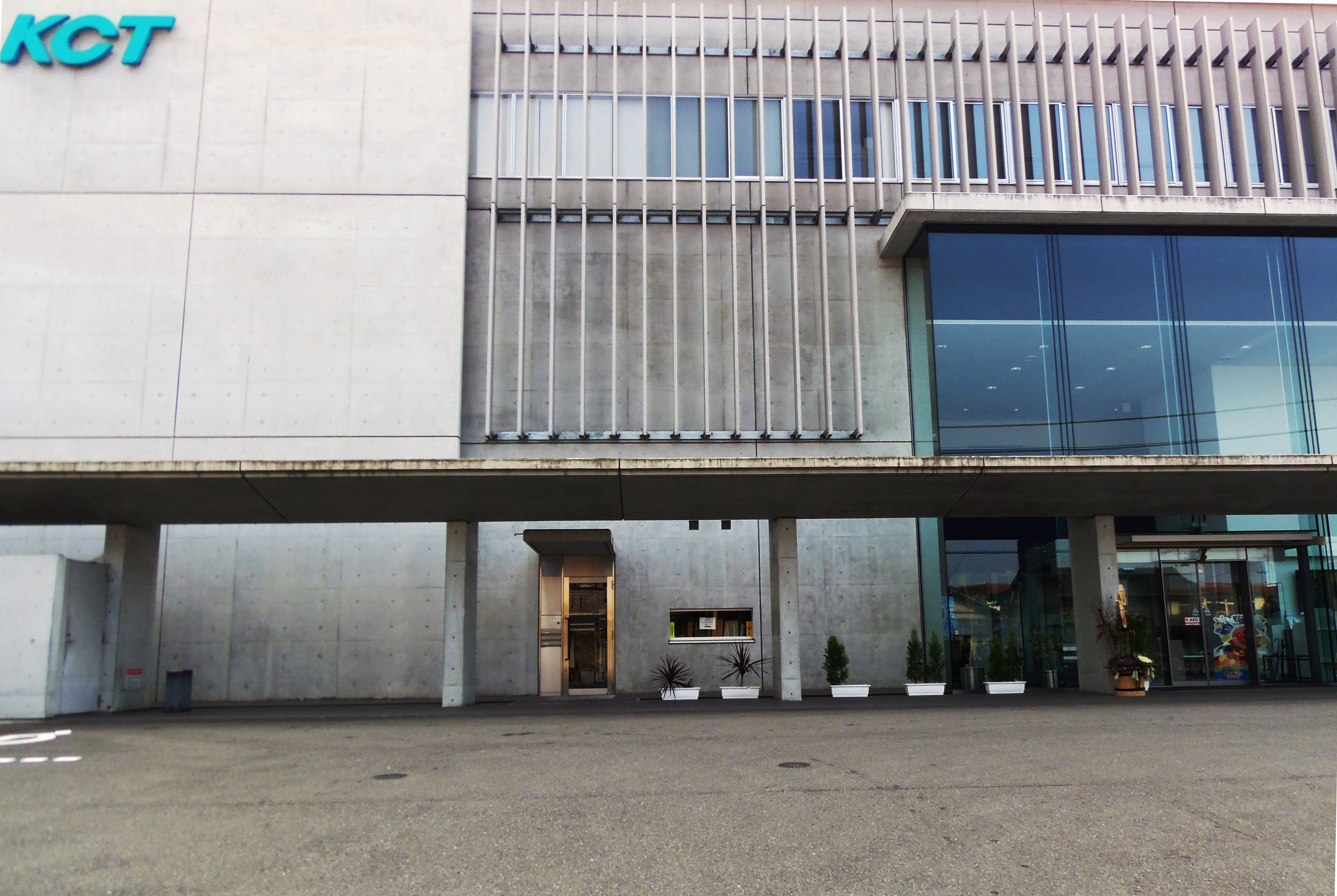 倉敷ケーブルテレビ局舎